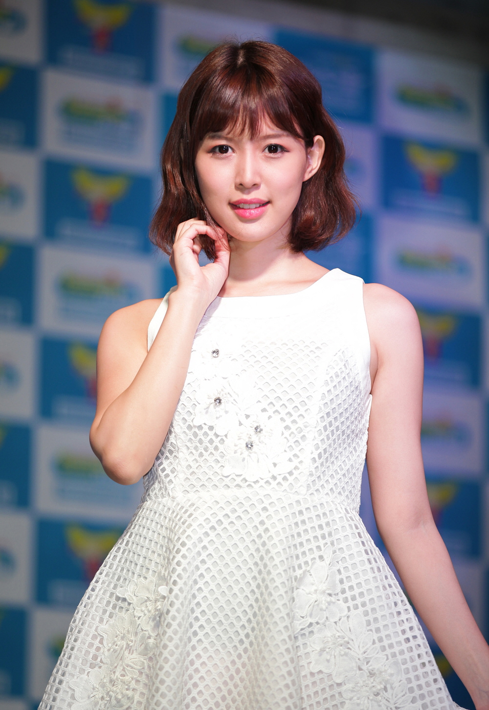 아오이츠카사(Aoi Tsukasa) 국내 팬미팅